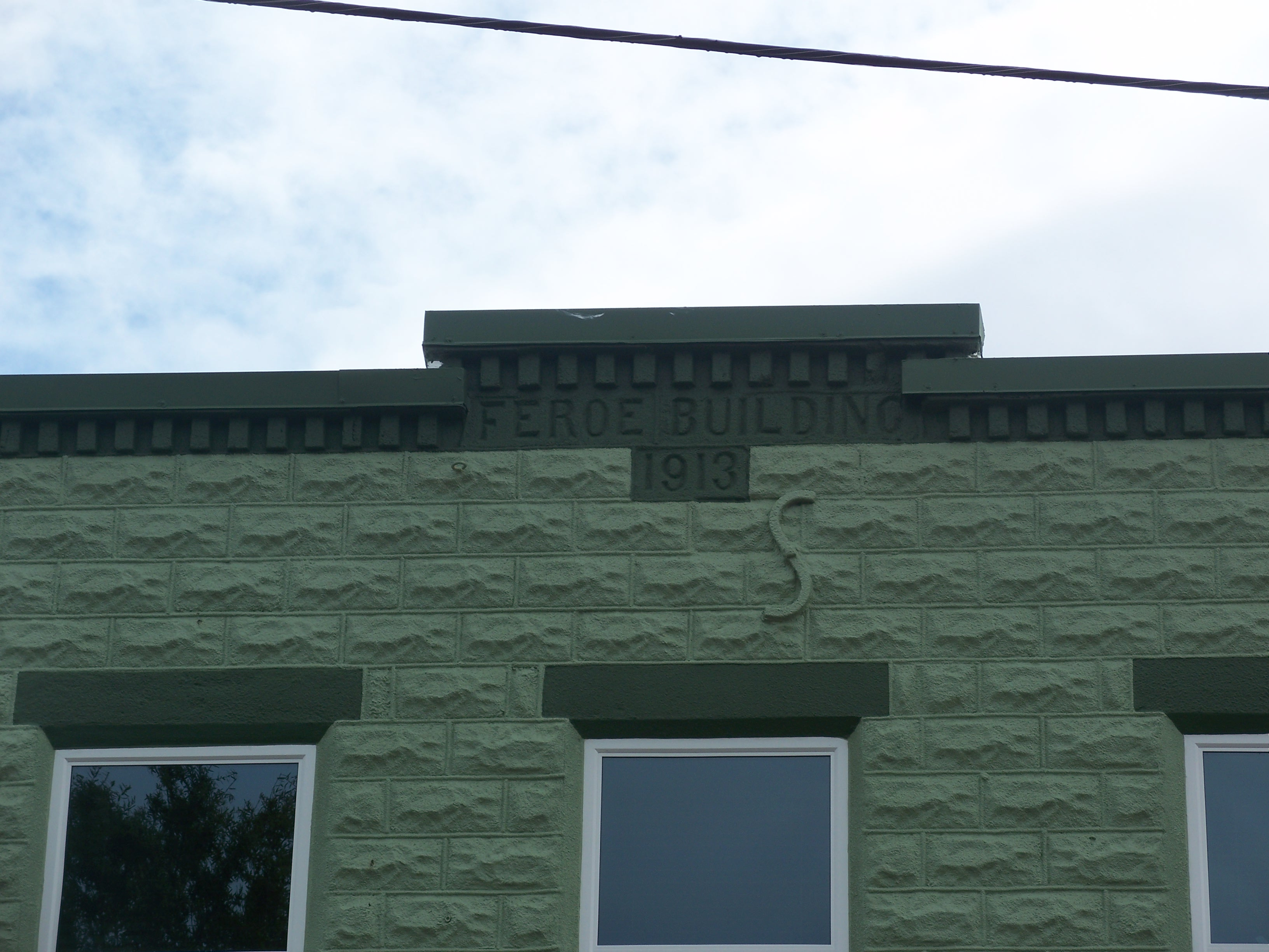 Stuart, Florida: Feroe Building